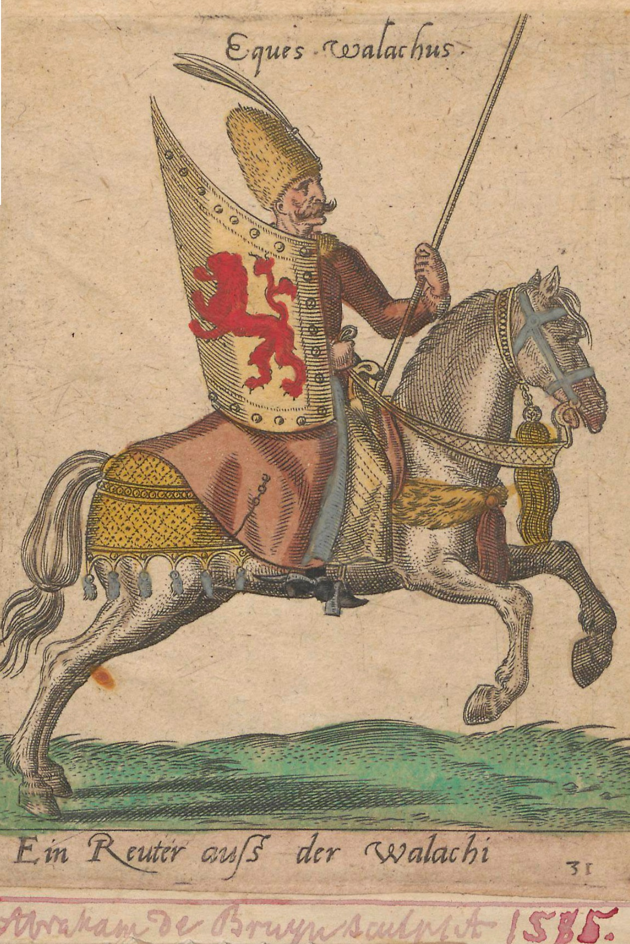 Soldat român din secolul al XVI-lea. Abraham de Bruyn Unknown